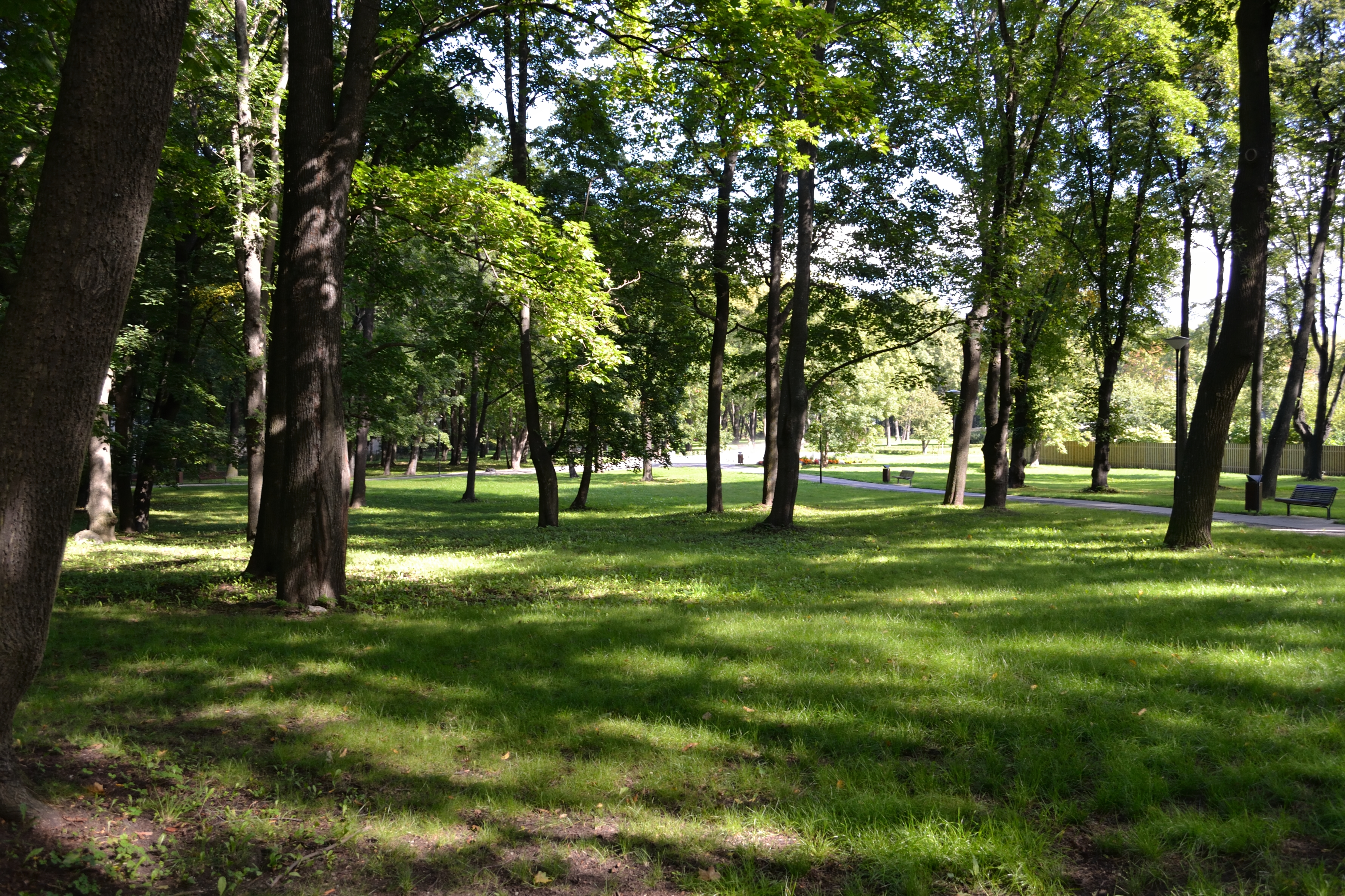 Tallinn, Kalamaja kalmistu